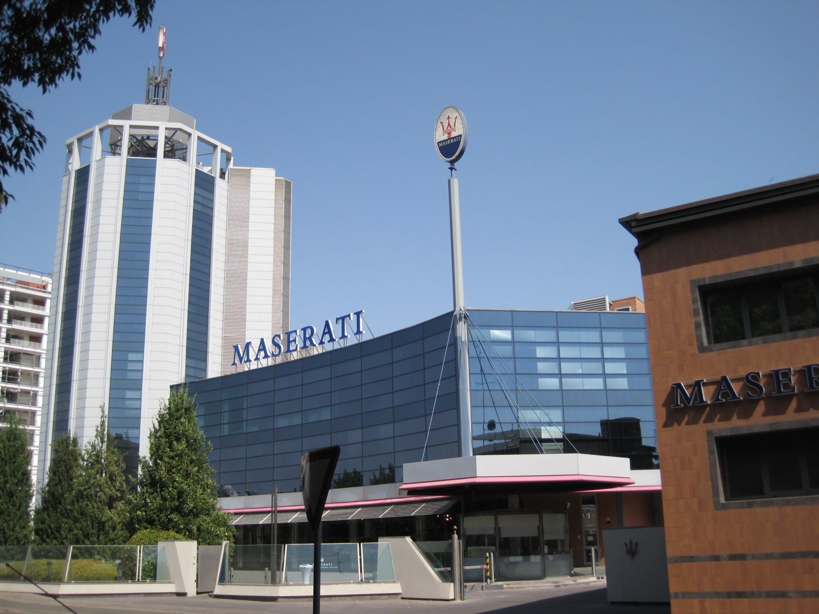 Maserati Showroom Modène